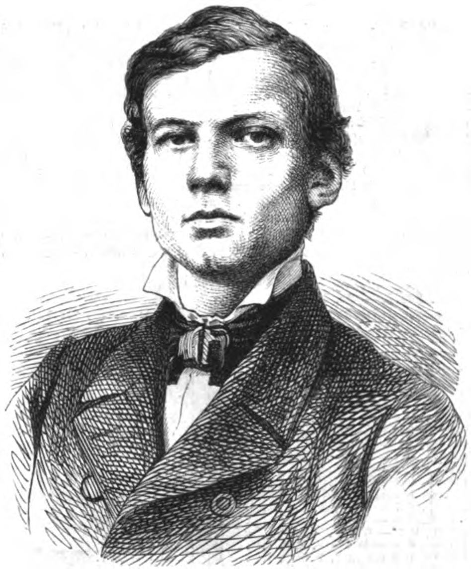 Porträt von Oskar Becker, 1861.